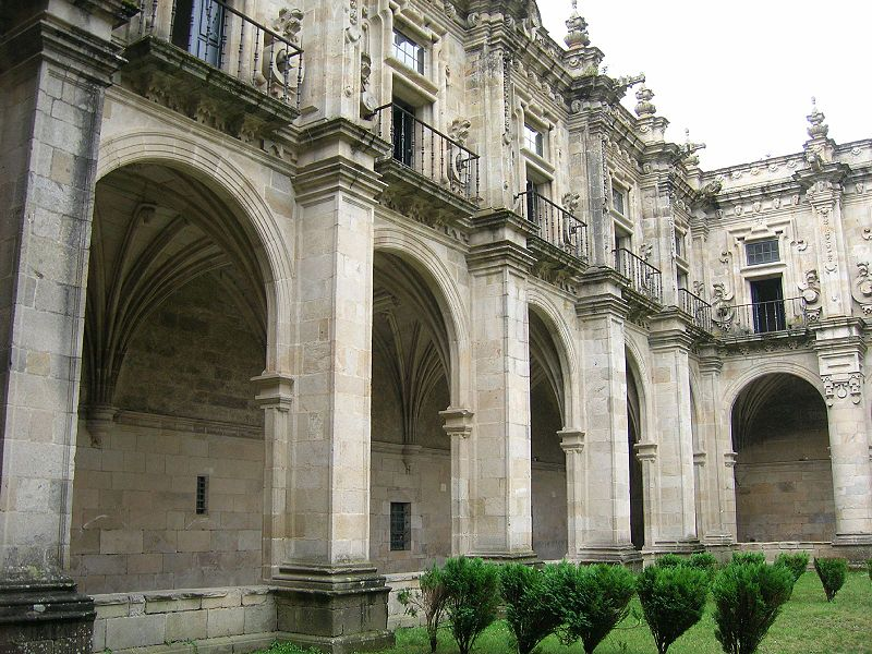 Description Claustro procesional do mosteiro de San Salvador de Celanova Date30 May 2007Source Antonio Gil Martínez. FREECATPermission (Reusing this file) cc-by-2.0 Claustro procesional do mosteiro de San Salvador de Celanova